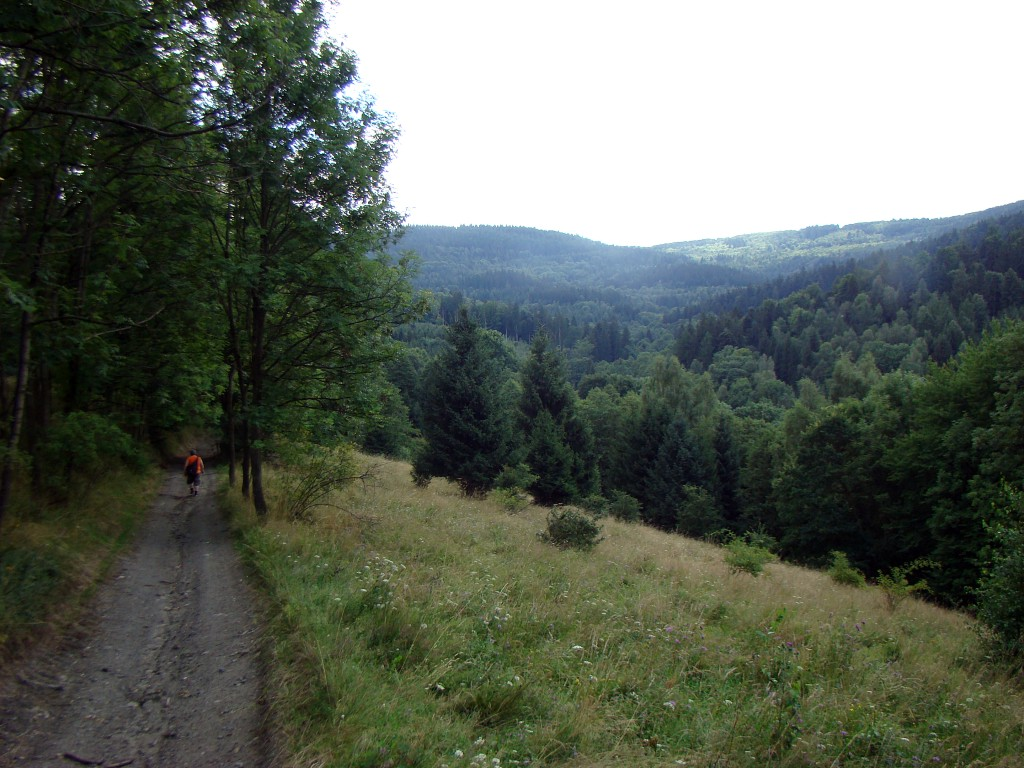 Widok na górną część doliny Rudego Potoku w Krowiarkach (Sudety Wschodnie).